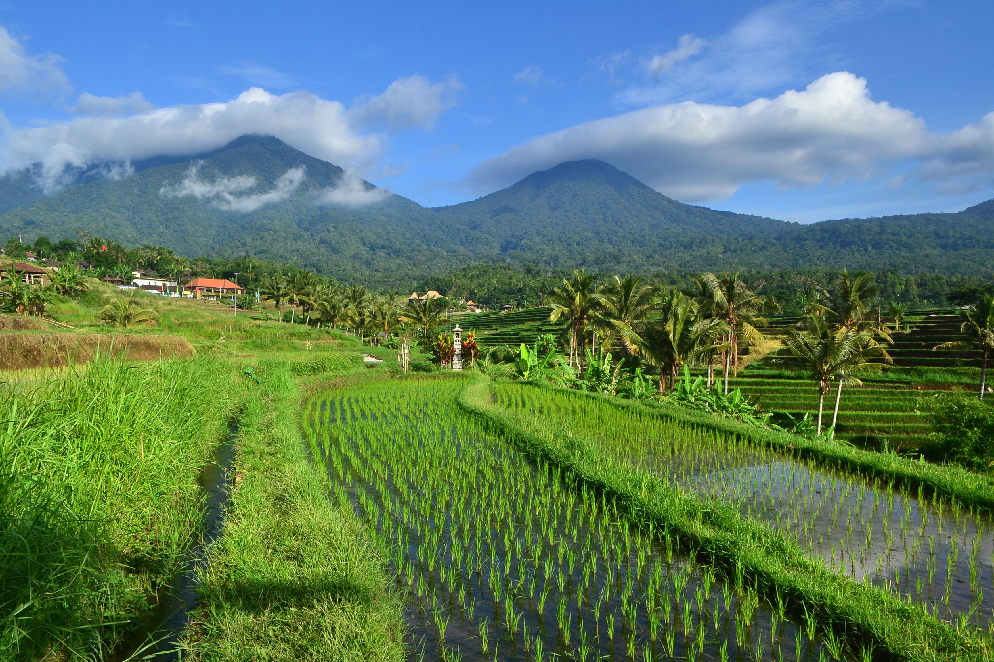 Jatiluwih memiliki pemandangan alam yang indah. Daerah persawahan ini berbentuk teras dengan luas sekitar 636 hektar. Sawah ini menggunakan sistem pengairan subak yaitu sistem pengairan atau irigasi tradisional Bali yang berbasis masyarakat. Foto ini menggunakan kamera DSLR Nikon D3100.